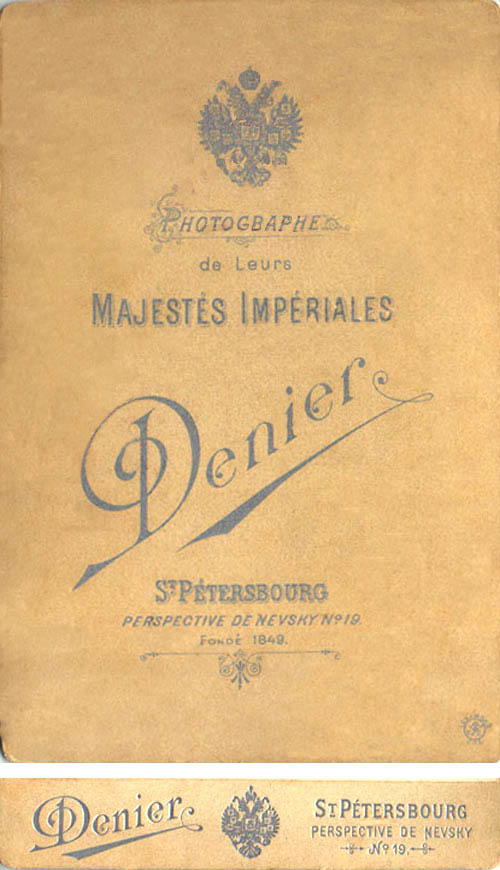 Паспарту Деньера